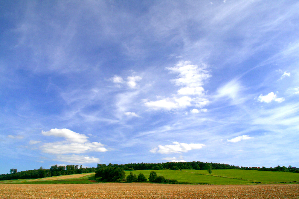 Der Bückeberg bei Hagenohsen